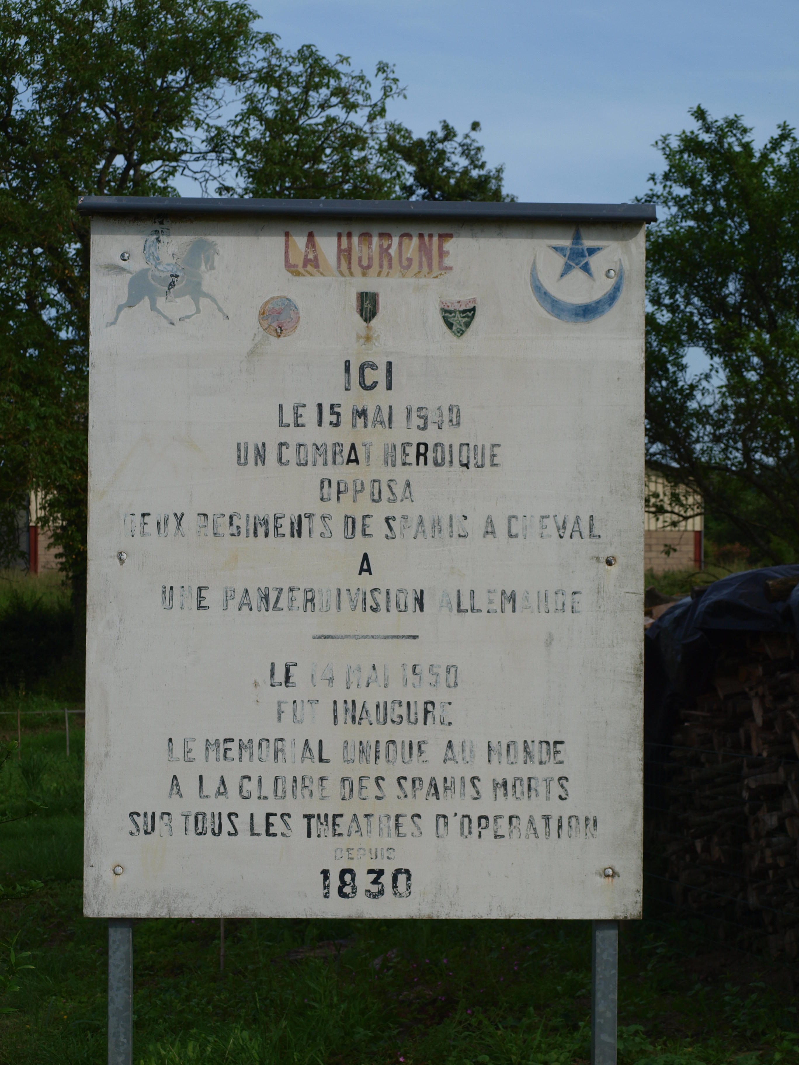 La Horgne (Ardennes, France)